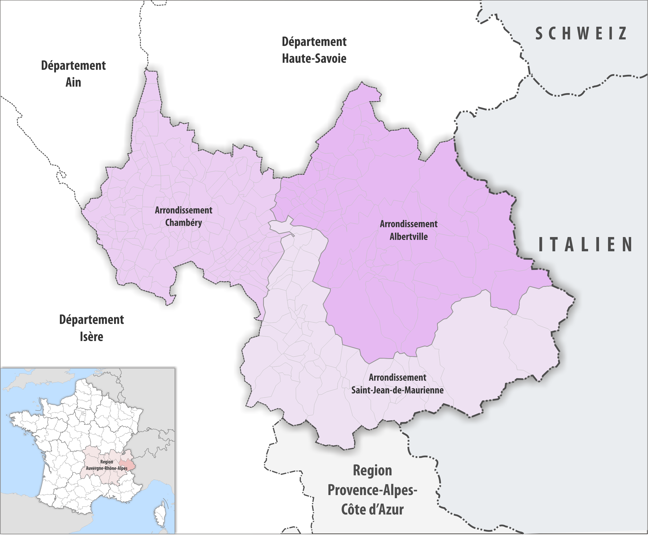 Gemeinden und Arrondissemente im Departement Savoie